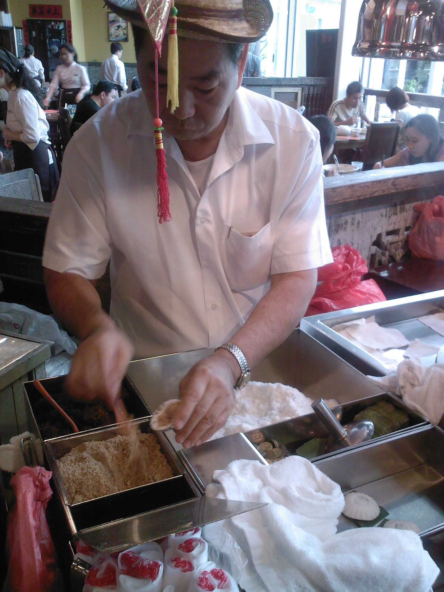 Kueh Tutu